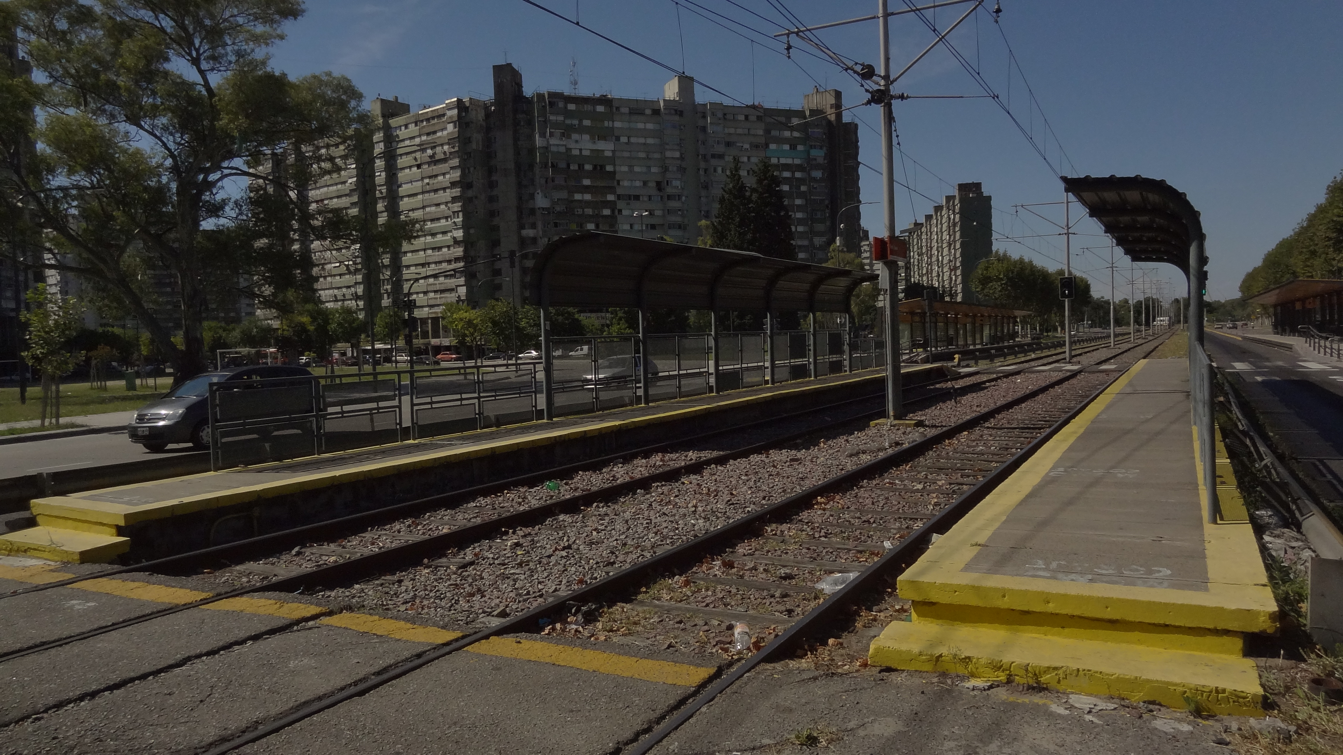 Estación General Savio, del Premetro de Buenos Aires, frente a los complejos habitacionales Lugano; y de la homónima estación del Metrobus.